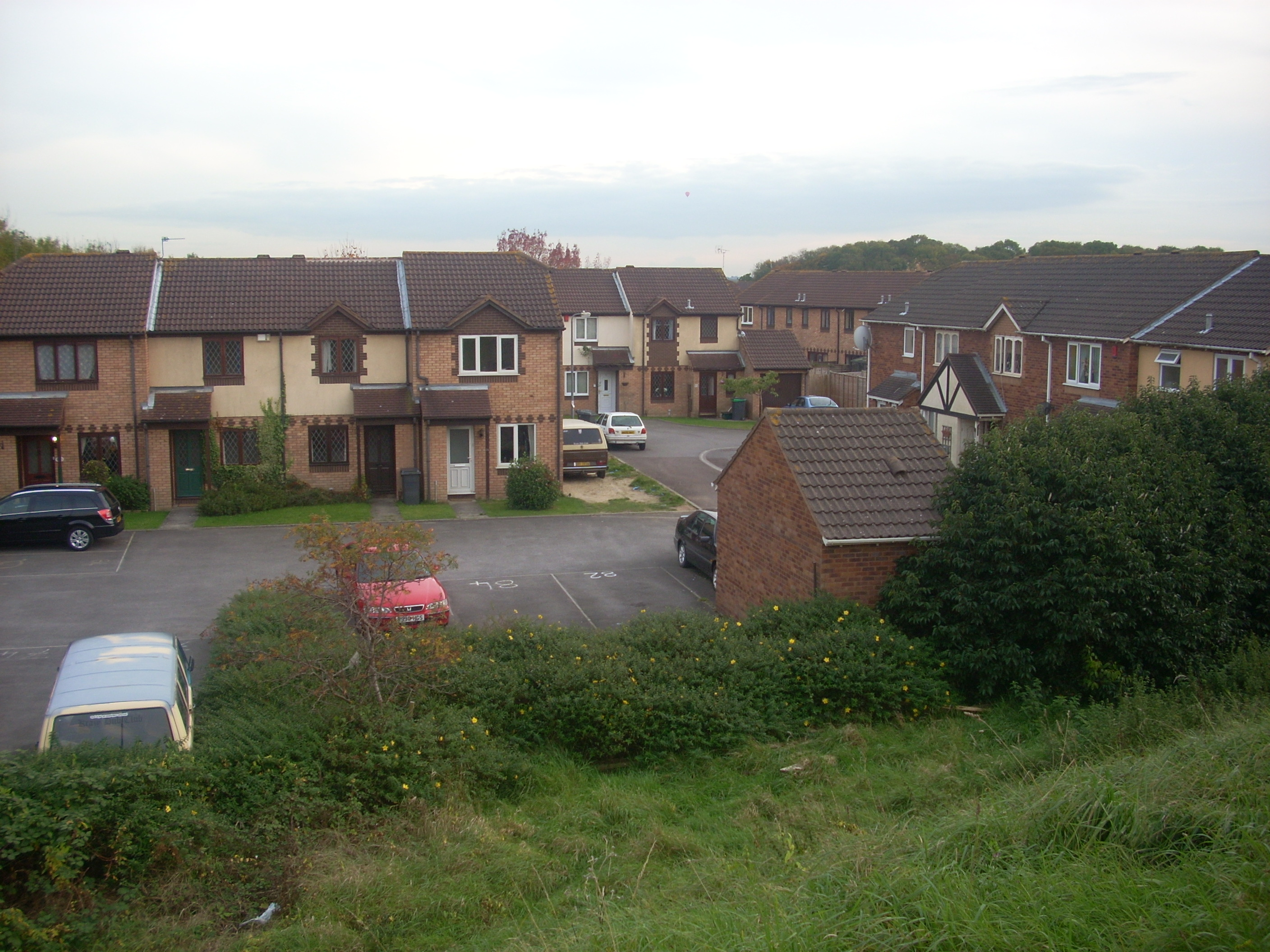 Domki w Bradley Stoke